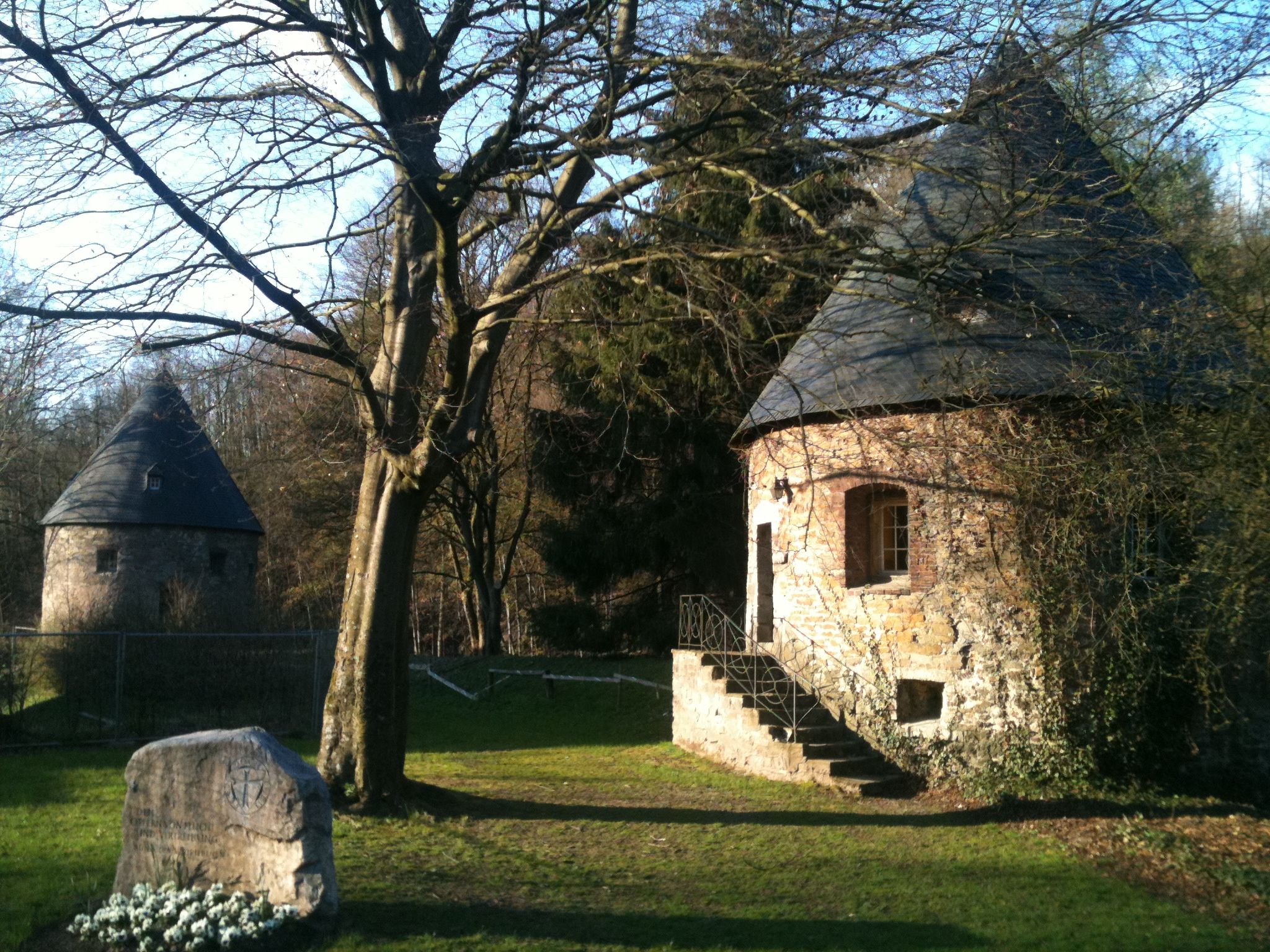 Schloss Hardenberg in Velbert-Neviges